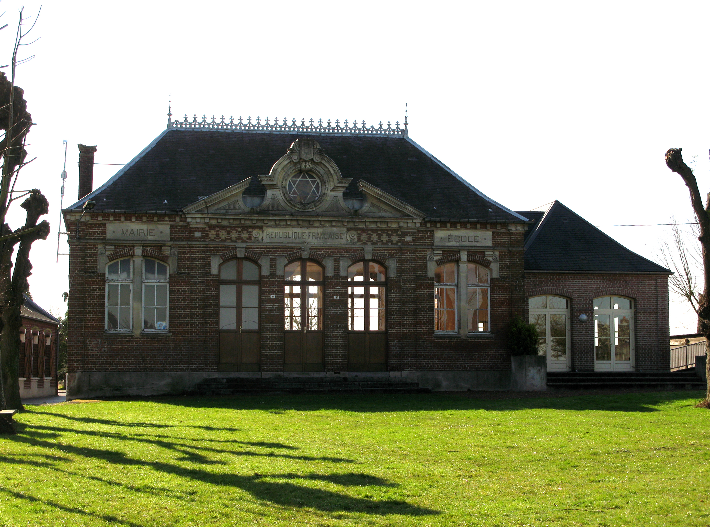 Baizieux (Somme, France) - La mairie, au bout de la grande place qui s'étend jusqu'au monument aux morts.